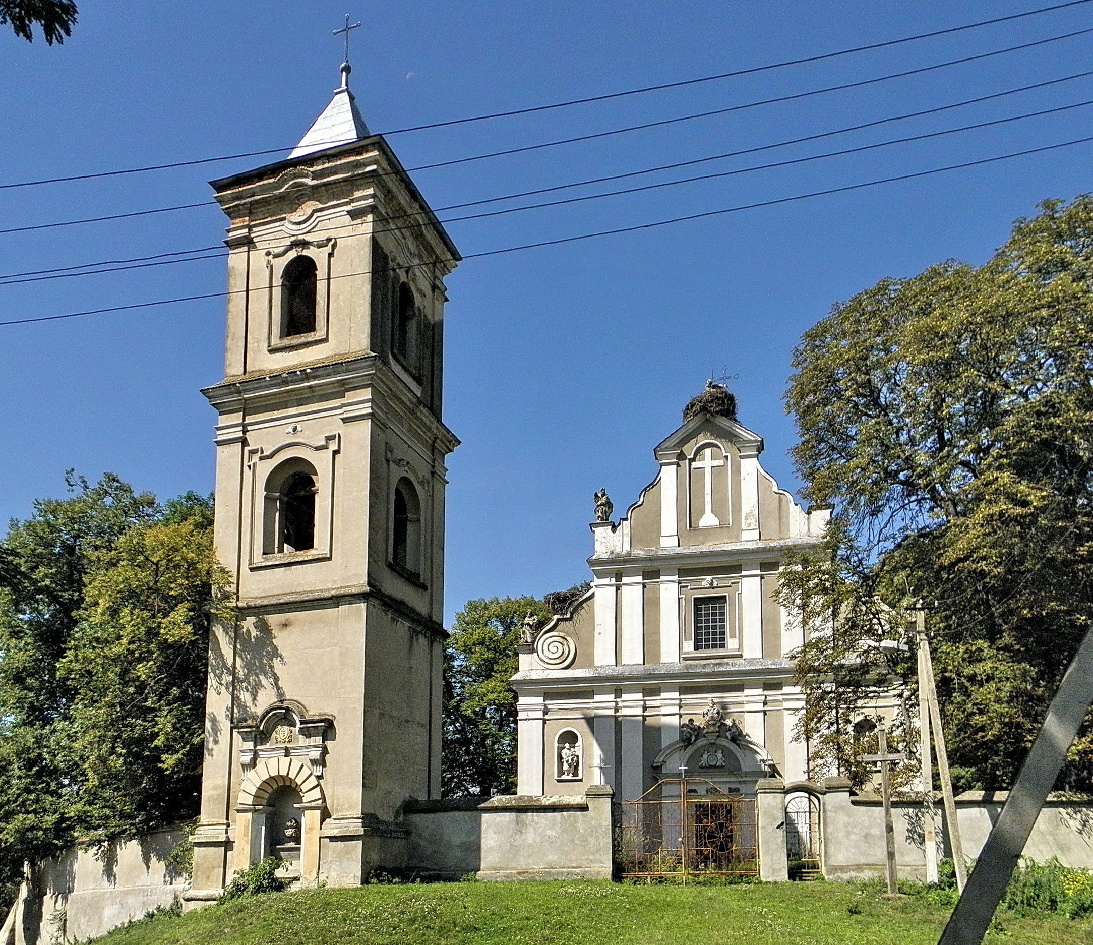 Костел Святої Трійці і дзвіниця (мур.), Устя-Зелене